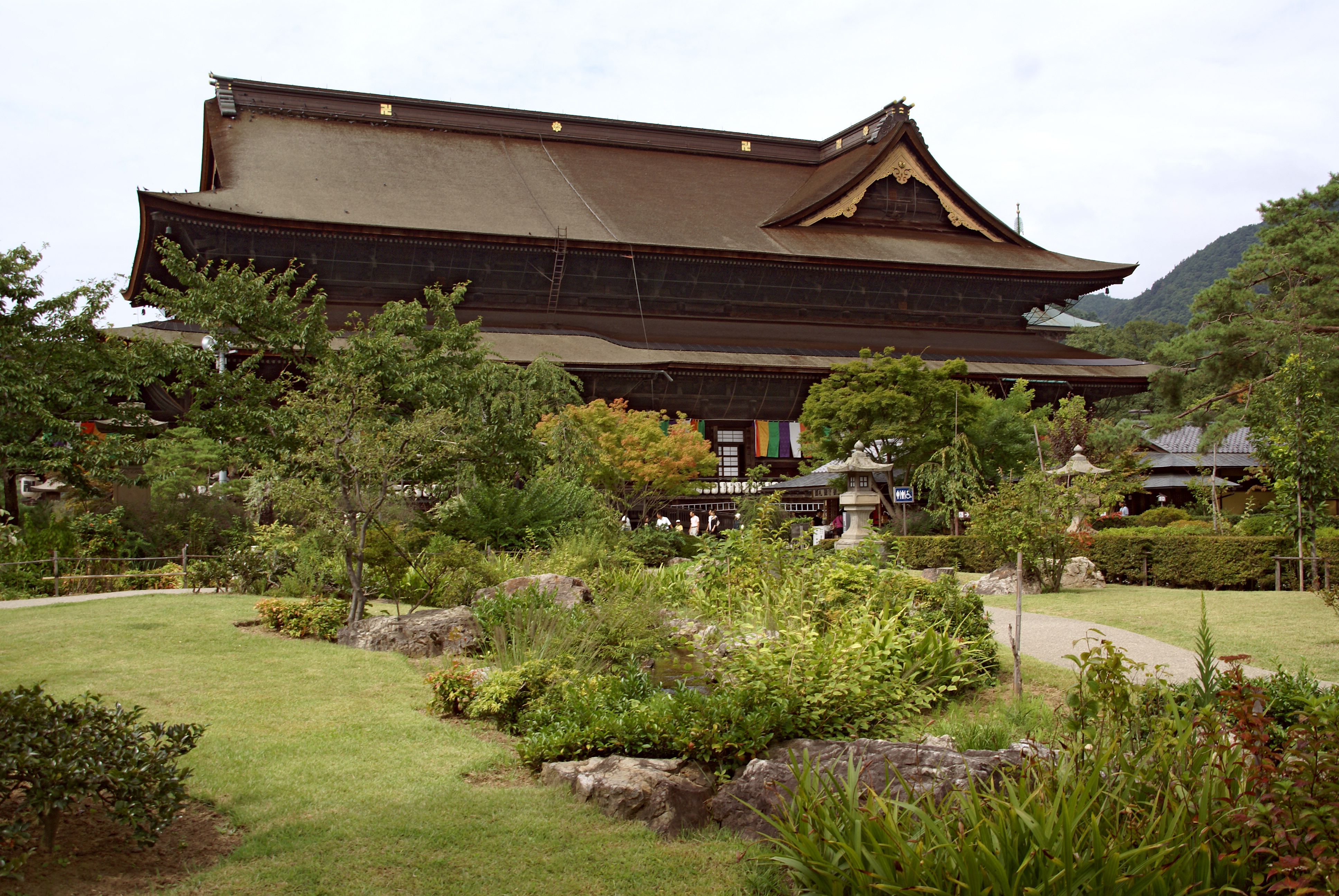 Zenkoji in Nagano, Nagano prefecture, Japan